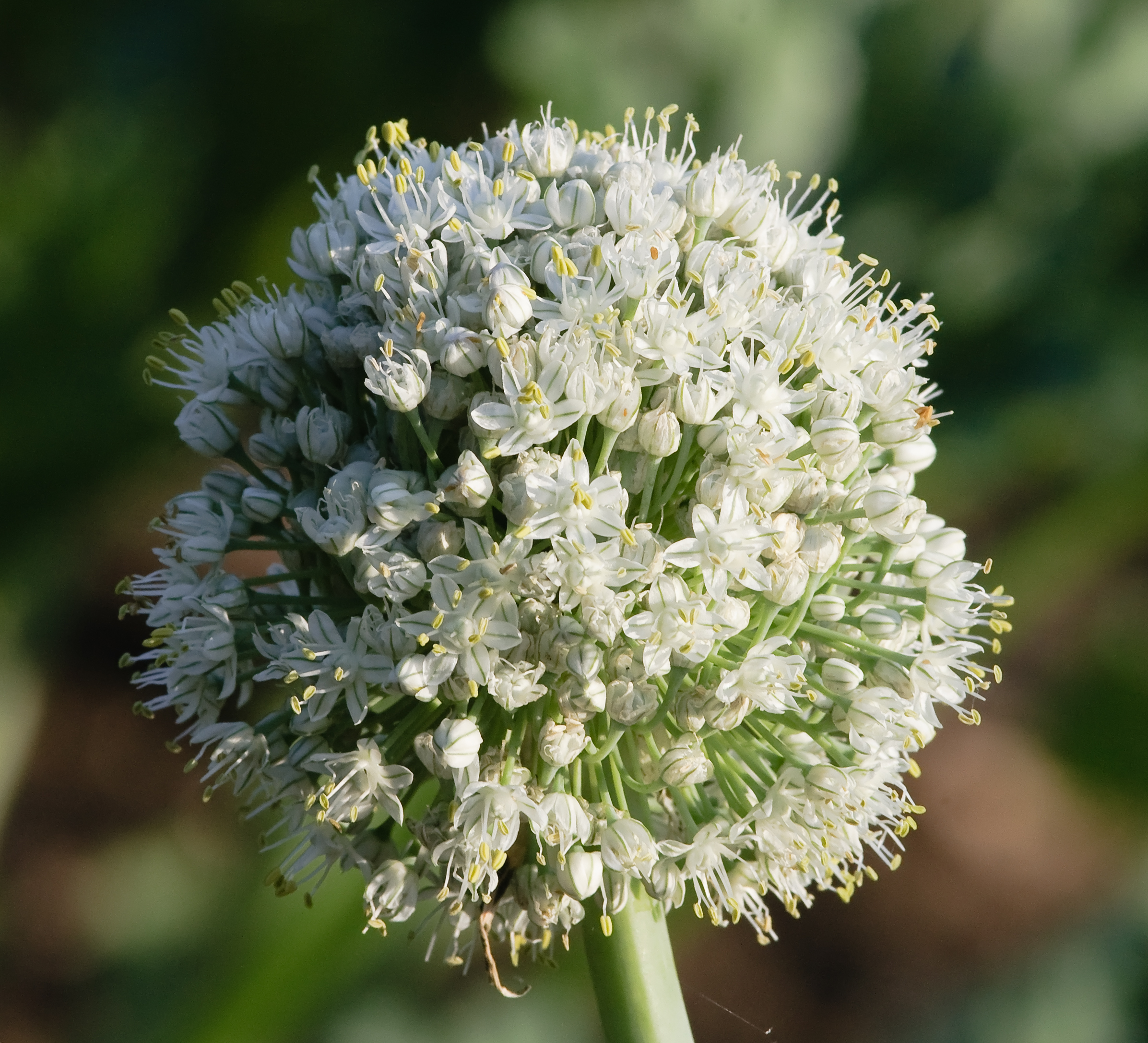 Blütenstand einer Zwiebel